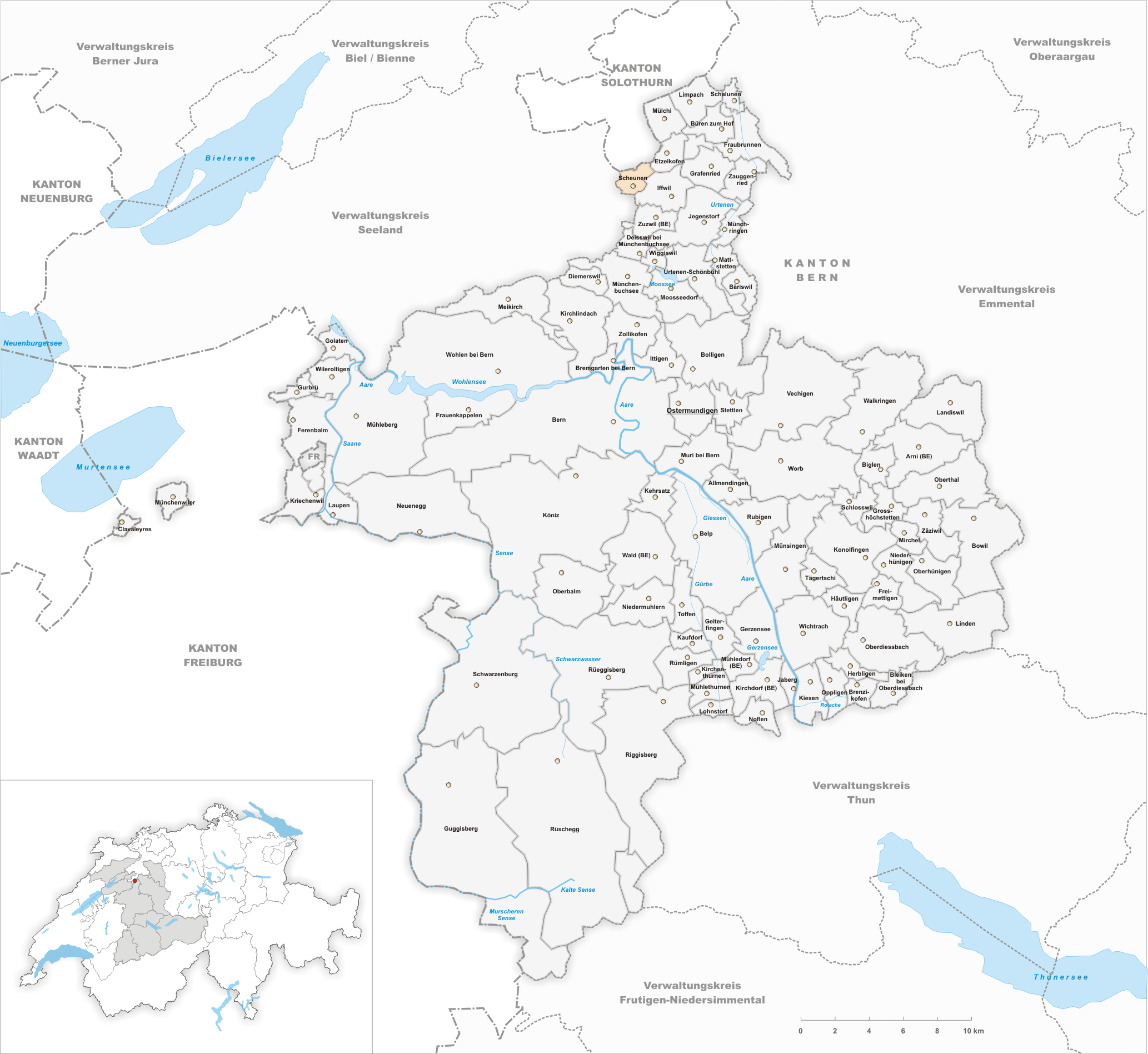 Municipality Scheunen